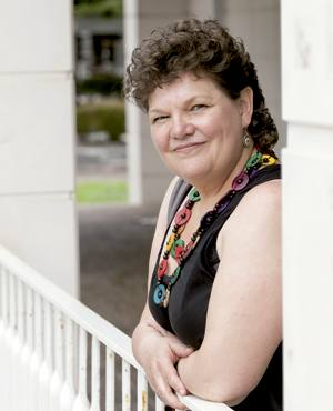 Inma Errea iruindar itzultzailea, 2012an